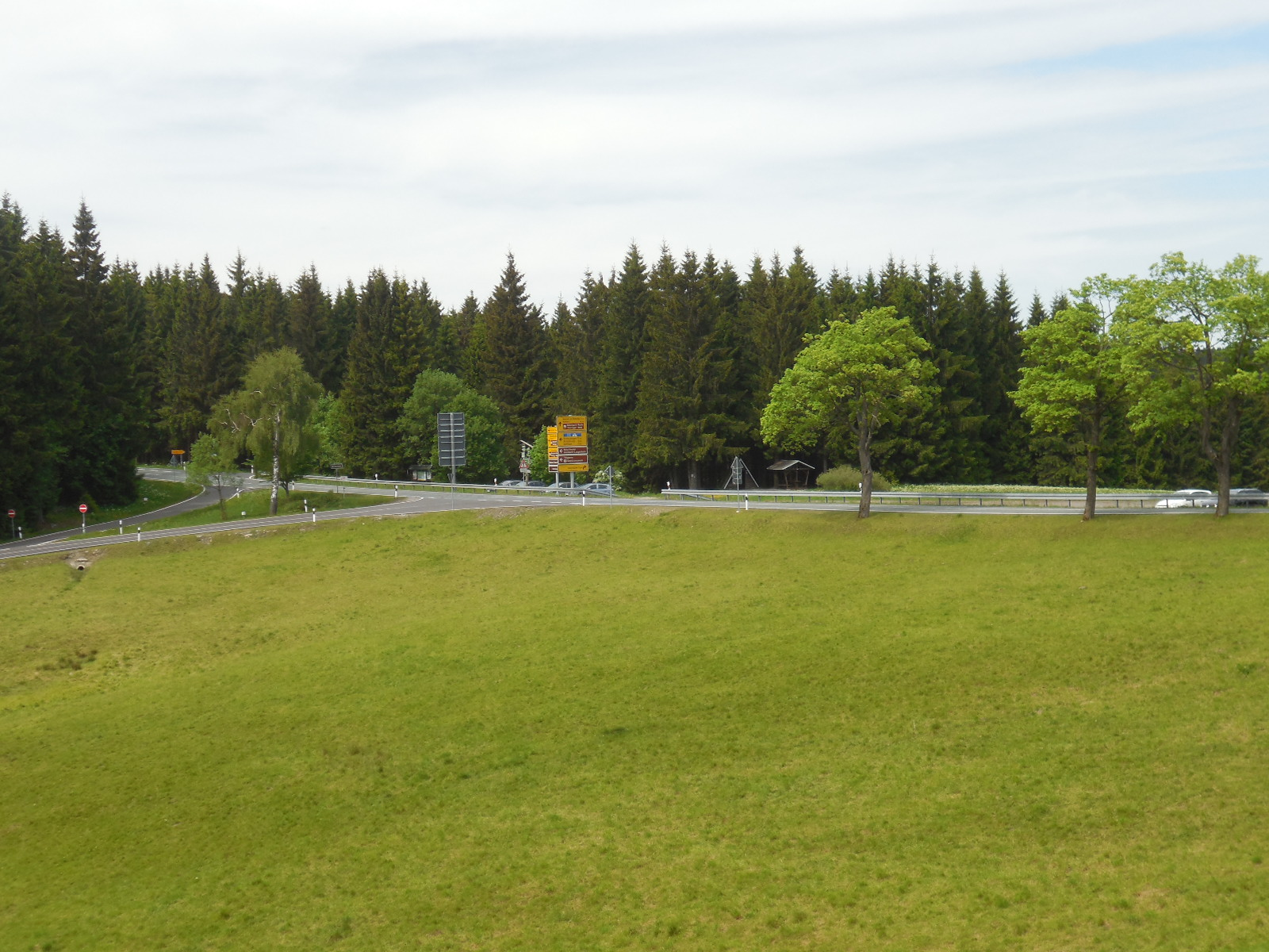 Die Kreuzung auf dem Schwalbenhaupt am Rennsteig